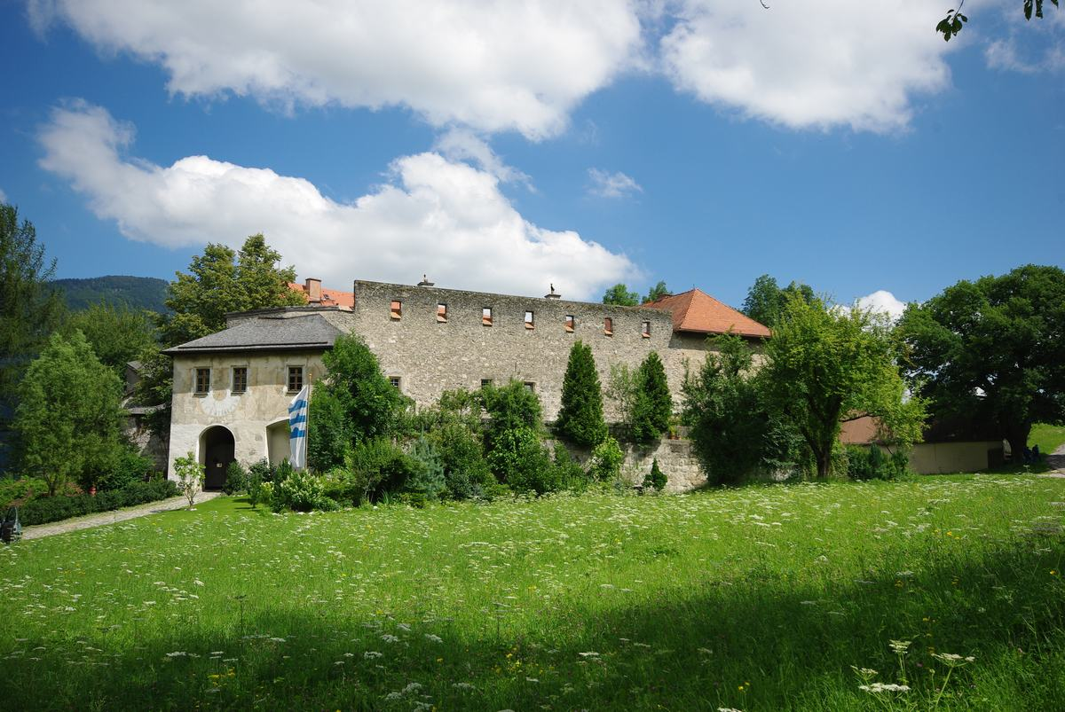 Gruttenstein